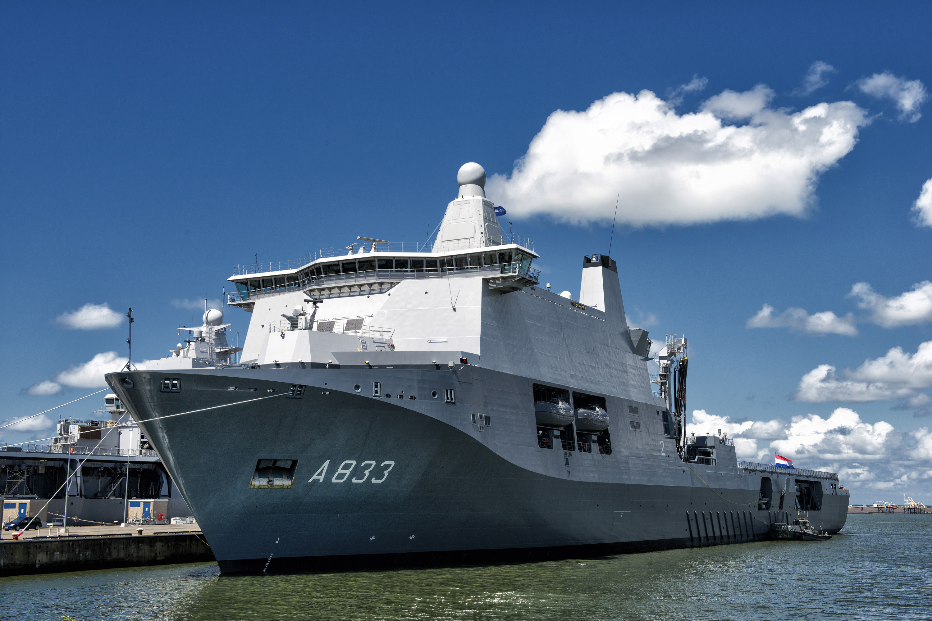 Binnenkomst Karel Doorman in Den Helder